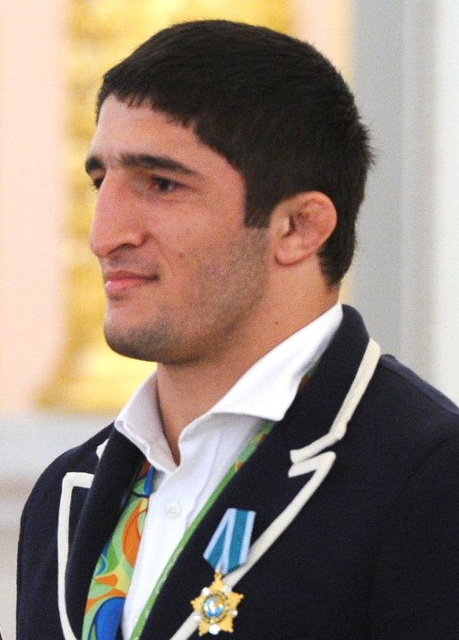 Абдулрашид Садулаев